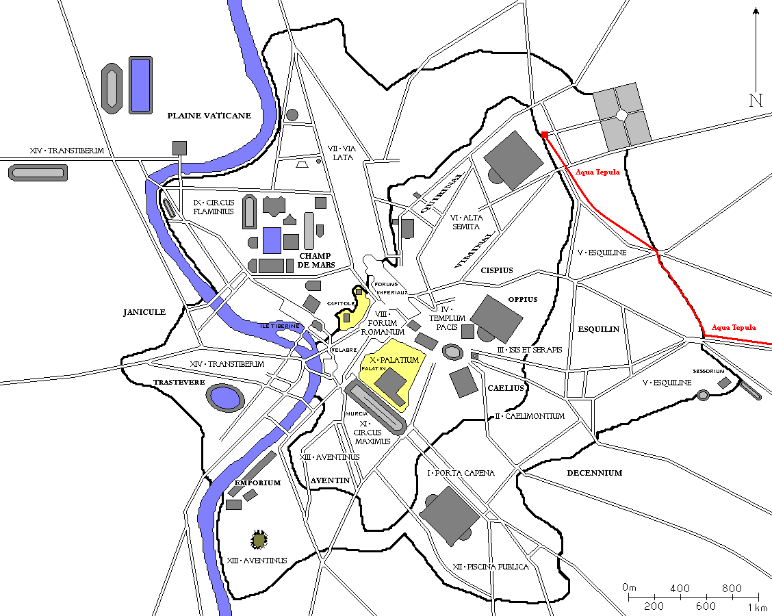 Plan de Rome avec l'Aqua Tepula en rouge.